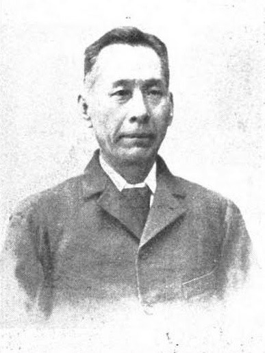 野沢卯之吉（1837～1918）。明治初年横浜市に出て外人間に生糸類其他の取引を開始、息子の野沢源次郎とともに東京で貿易商「野沢組」を営み、イギリスから製帽の機械を購入して東京の谷中初音町（現・台東区）に初音合資会社を設立、社員の氣賀賀子治（浜松の素封家）の誘致で明治29年（1896年）に浜松に移転し、帝国製帽株式会社（現・テイボー）となる